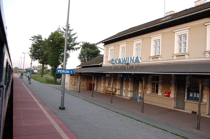 Stacja Kolejowa w Skawinie widziana z pociągu